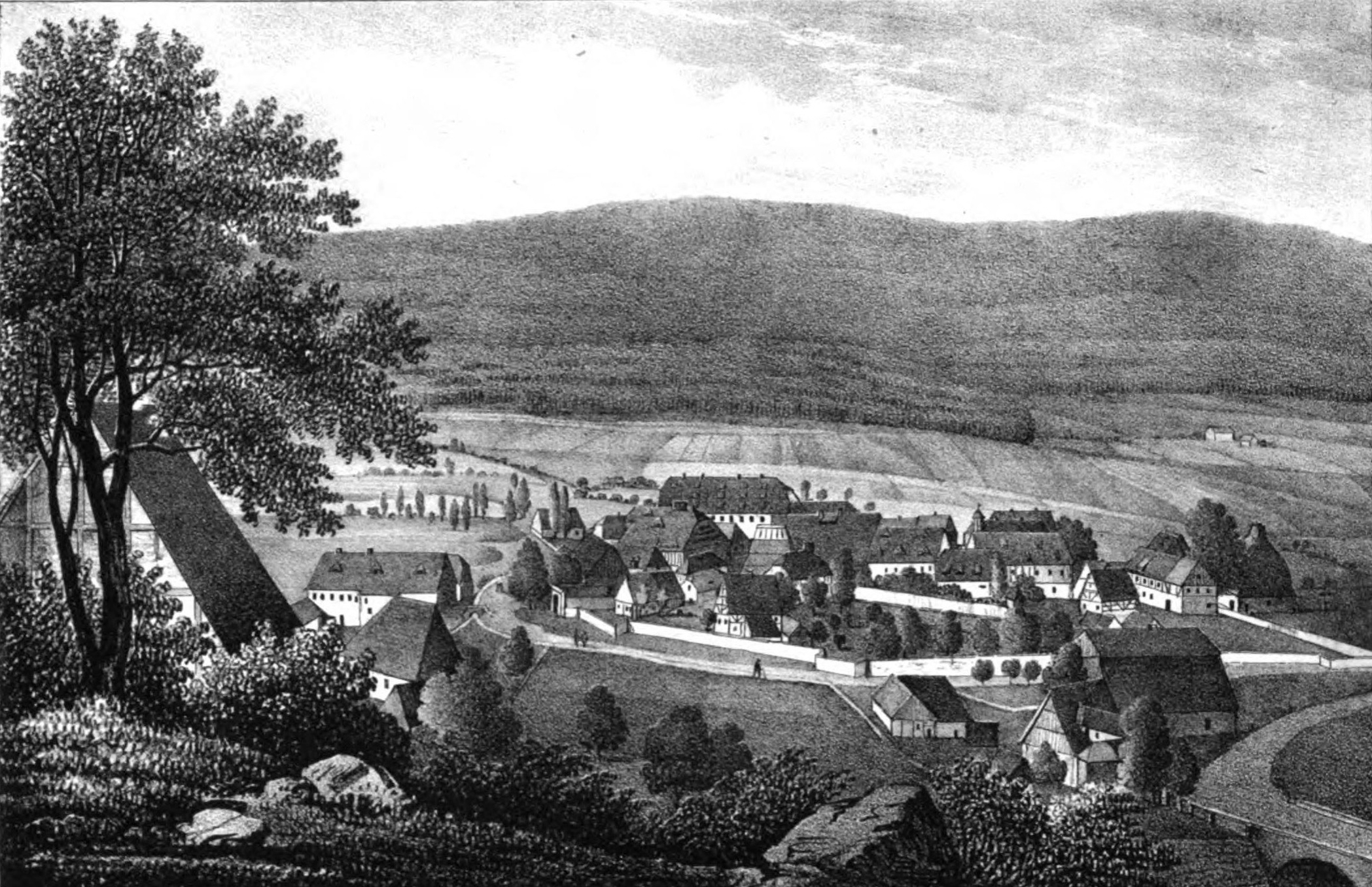 Saxonia Museum für saechsische Vaterlandskunde. Band 2. Dresden: Pietzsch und Comp. Siehe File:Saxonia Museum für saechsische Vaterlandskunde II.djvu